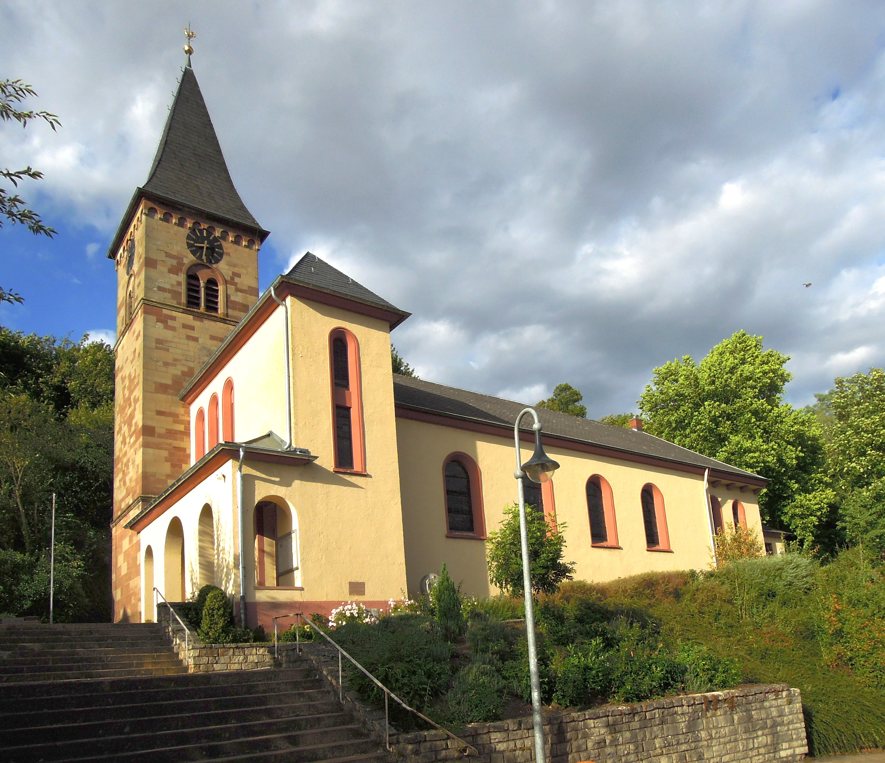 Kloppstraße, kath. Pfarrkirche St. Nikolaus (Einzeldenkmal)